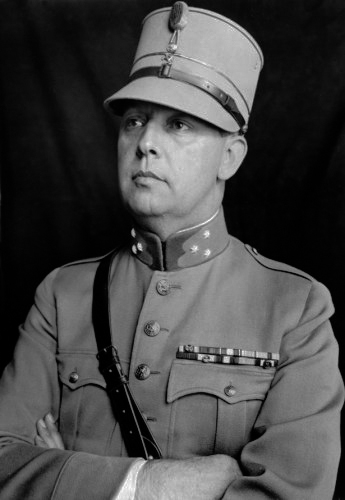 Sportleider en voetbaltrainer Karel Lotsy is tot kapitein bij de Generale Staf benoemd en zal de sportorganisatie van het leger ter hand nemen.Nederland, Den Haag 5 oktober 1939